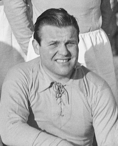 Daaf Drok